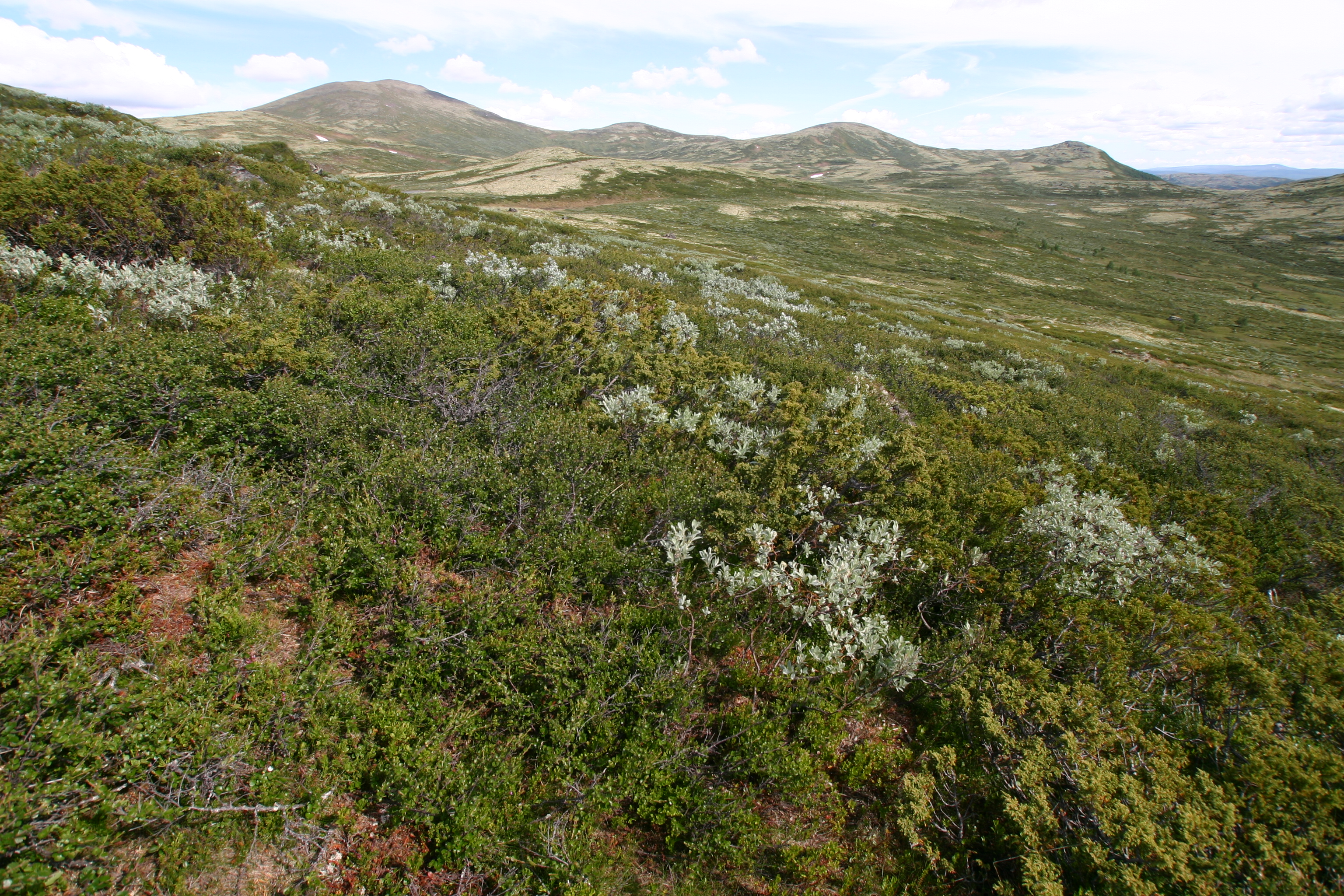 Rishei er den mest vanlige vegetasjonstypen i Norge